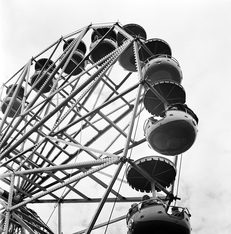 Pariserhjulet "Riesenrad" på Gröna Lund, detalj underifrån